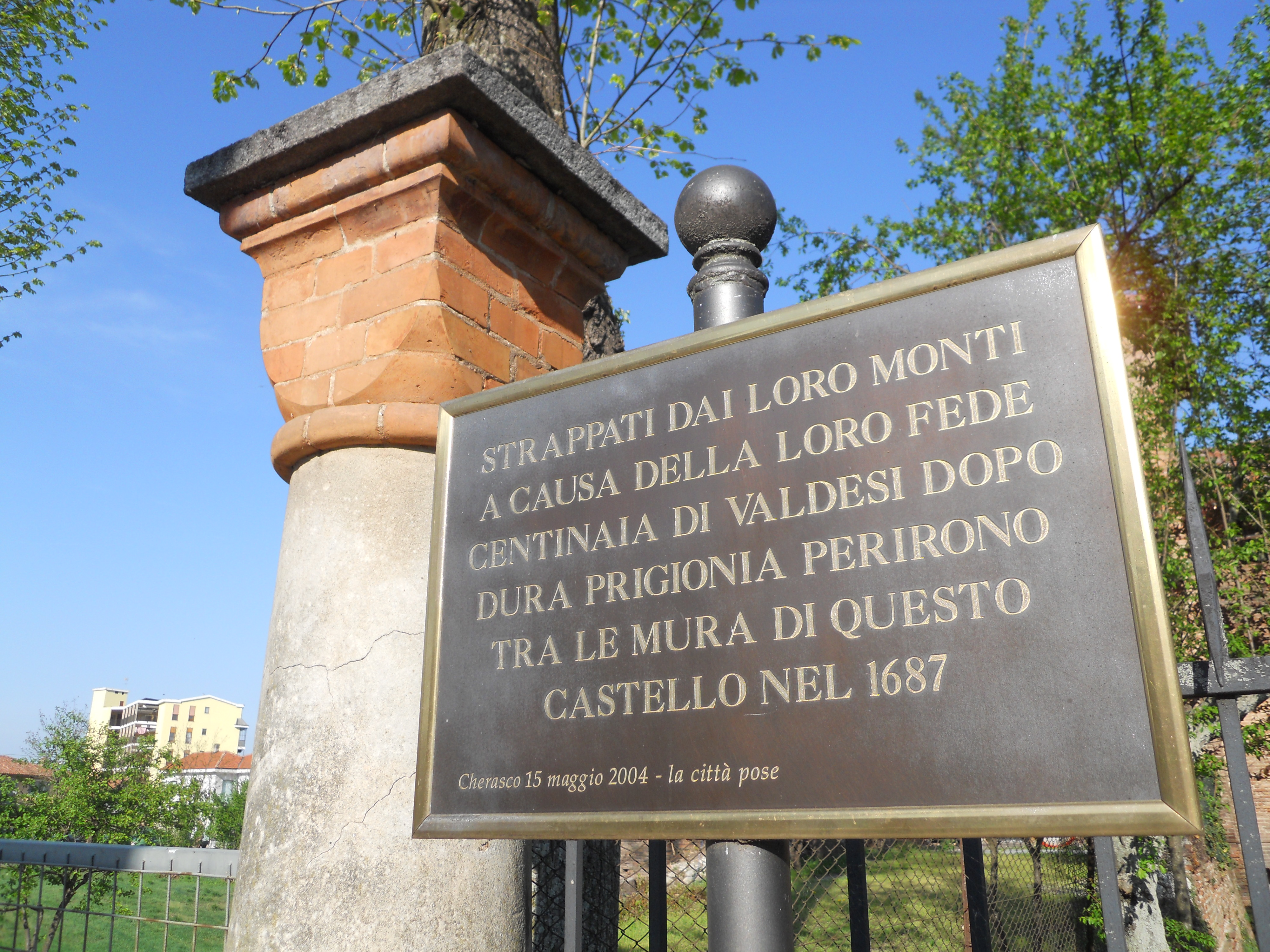 Targa per ricordare la prigionia dei Valdesi a Cherasco